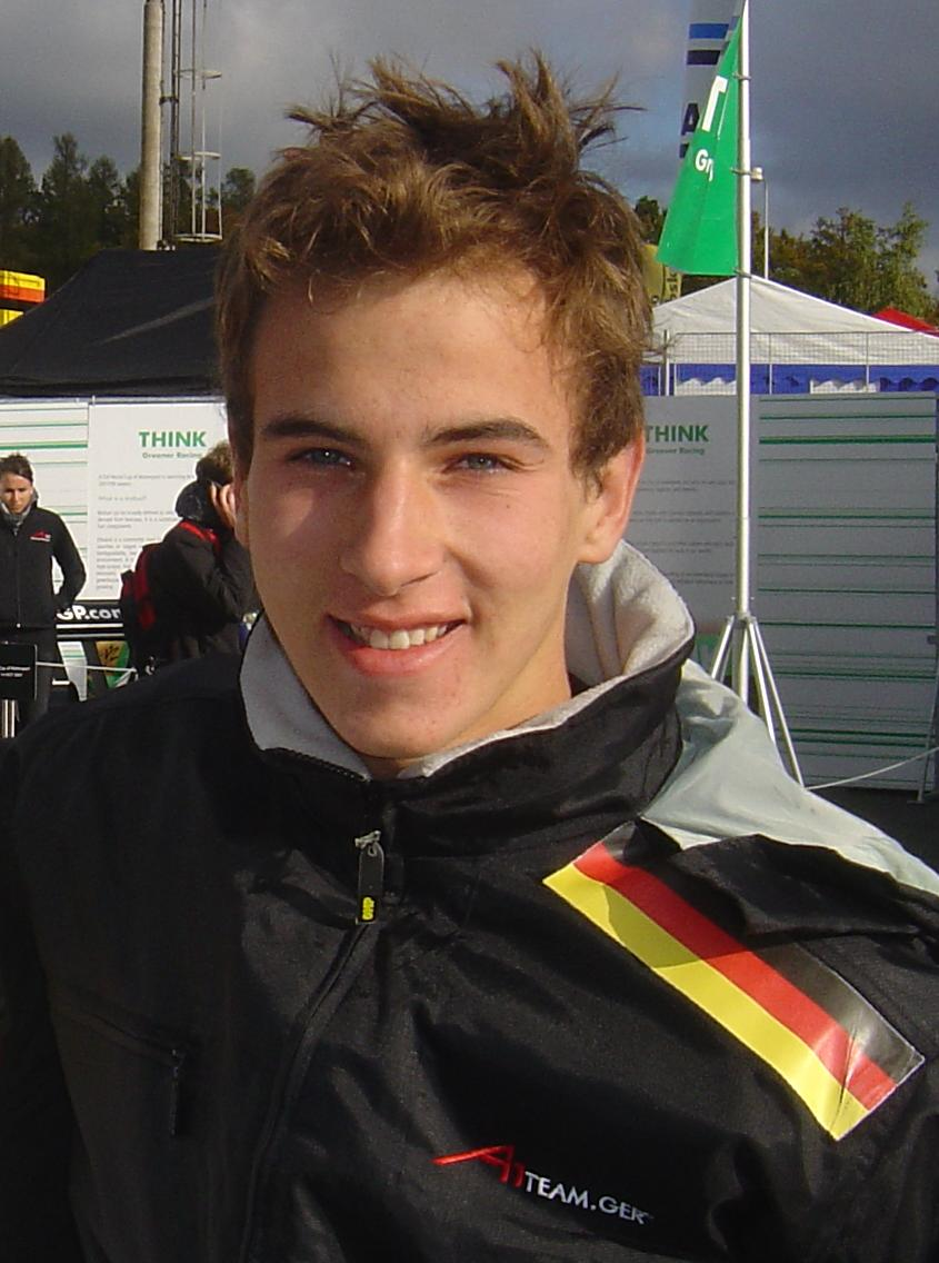 Christian Vietoris, Bild entstanden im Rahmen des A1GP-Rennwochenendes auf dem Automotodrom Brno.